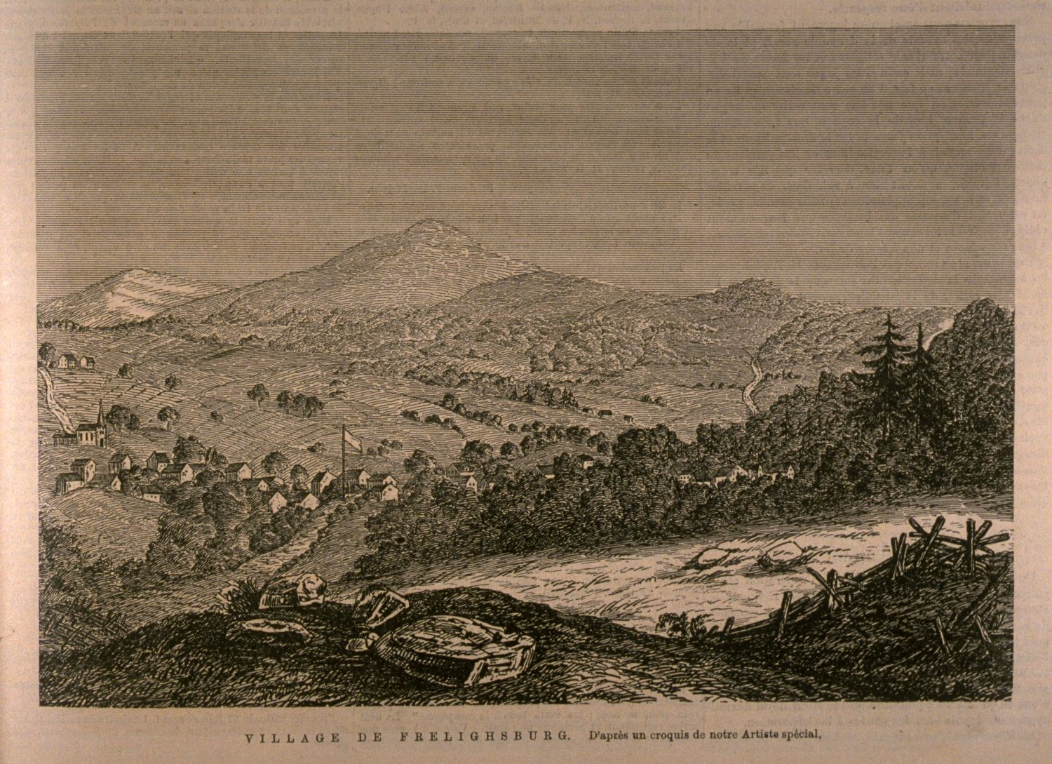 Parution dans l'hebdomadaire L'Opinion publique Vol. 1, no 26 (30 juin 1870), p. 205 PER O- 104; MIC A209 This image is from the Canadian Illustrated News, 1869-1883, held in the Library and Archives Canada under record 1137